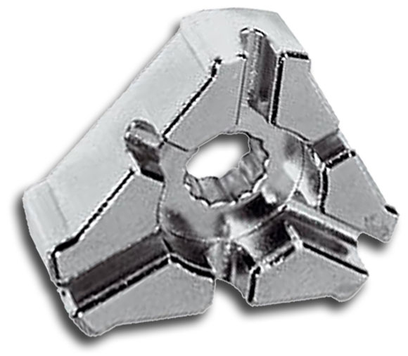 Nippelspanner